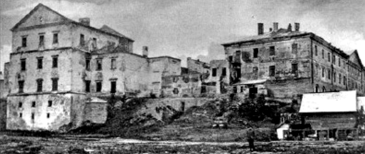 Тернопільський замок по війні.